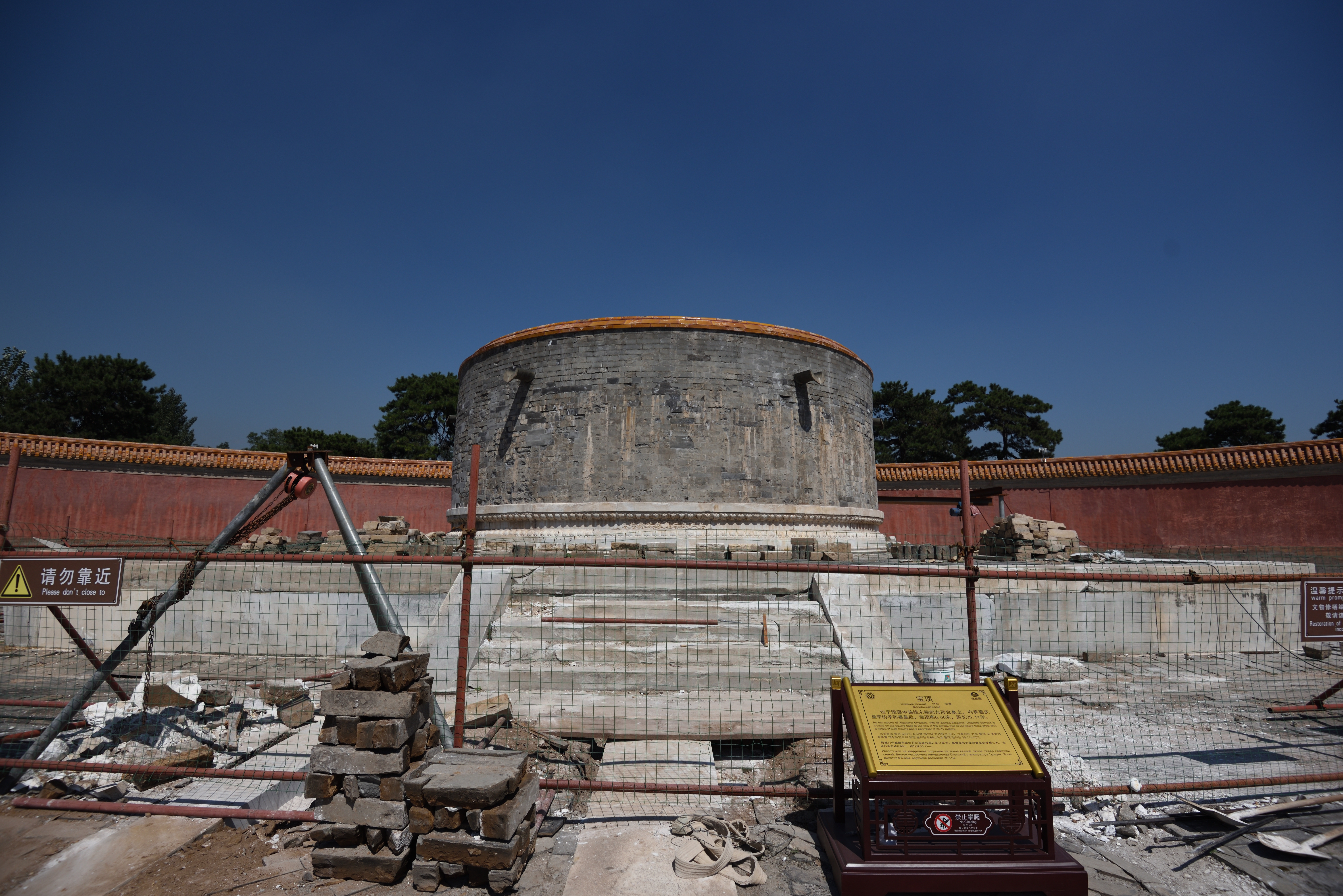 昌西陵（嘉庆孝和睿皇后陵）